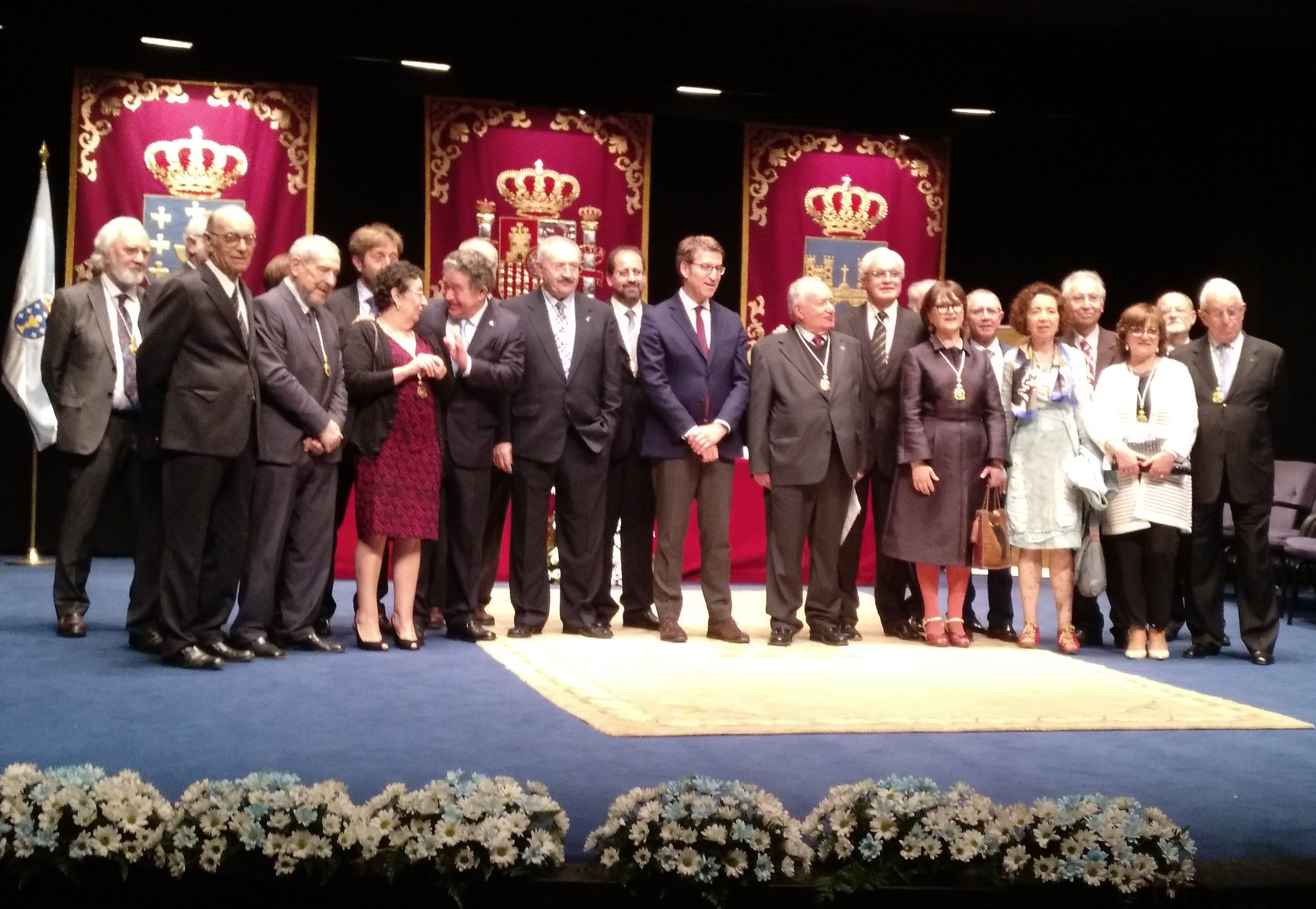 Acto da Real Academia Galega no Teatro Principal de Pontevedra o 17/05/2018, Día das Letras Galegas, en honor a María Victoria Moreno.Na fotografía aparecen o Presidente da Xunta de Galicia e os membros da Real Academia Galega